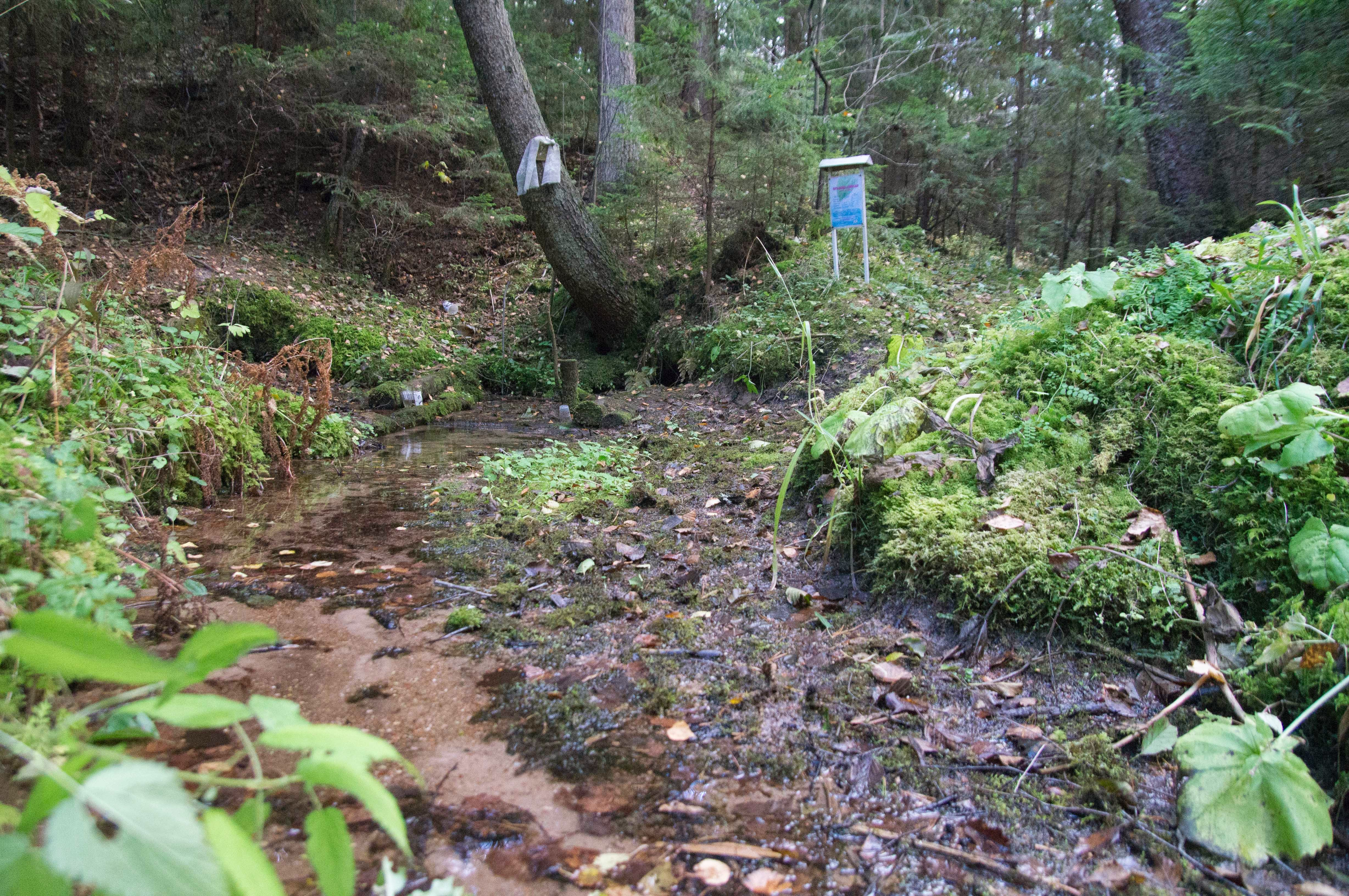 Крыніца «Святая вада»